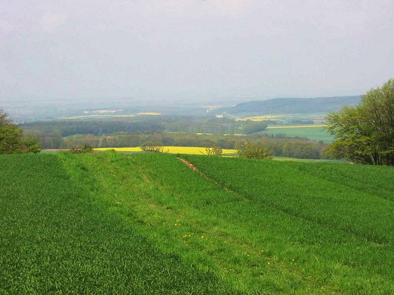 Ausblick vom Herkelstein in die Kölner Bucht